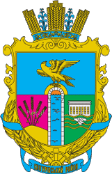 Герб Снігурівського району